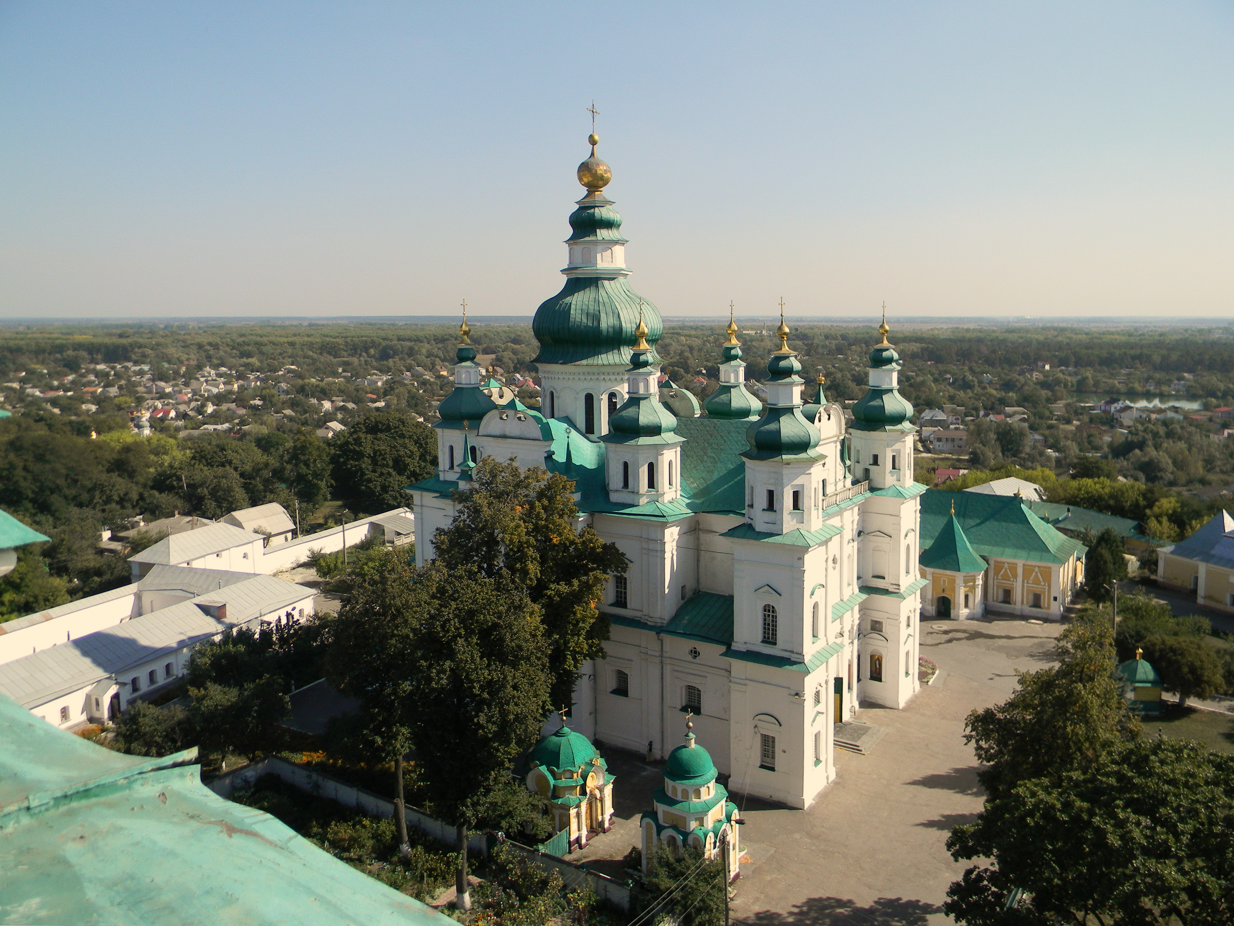 Комплекс споруд Троїцького монастиря (мур.), Чернігів, вул.Толстого, 92-Е